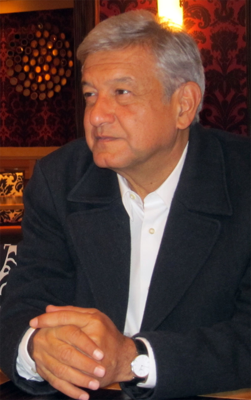 Andrés Manuel López Obrador in Washington D.C.